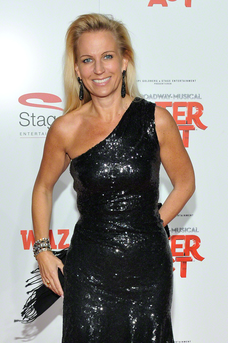 Claudia Wendler (bürgerlich Norberg) auf einer Musical-Premiere in Oberhausen am 3. Dezember 2013